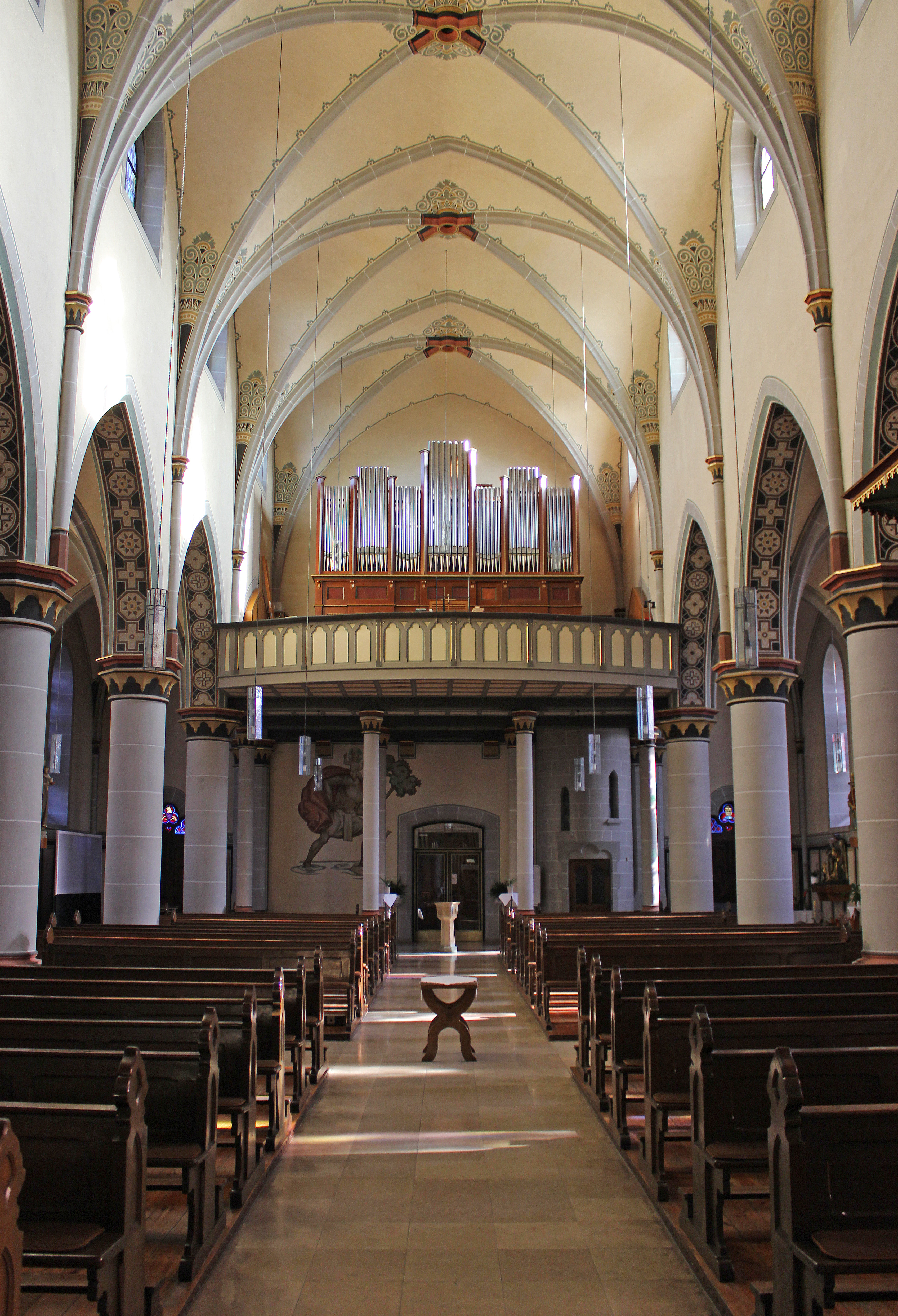 Blick ins Innere der katholischen Pfarrkirche St. Johannes Baptista in Altenkessel, einem Stadtteil der saarländischen Landeshauptstadt Saarbrücken